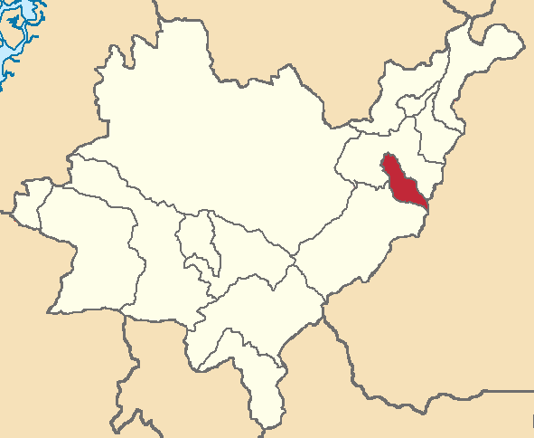 Mapa localizacor del cantón en Azuay, Ecuador